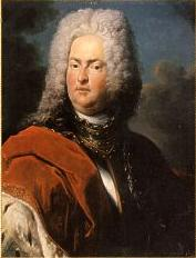 Johann Adam Andreas von Liechtenstein (Juan Adán Andrés). Príncipe de Liechtenstein (1699 - 1712)